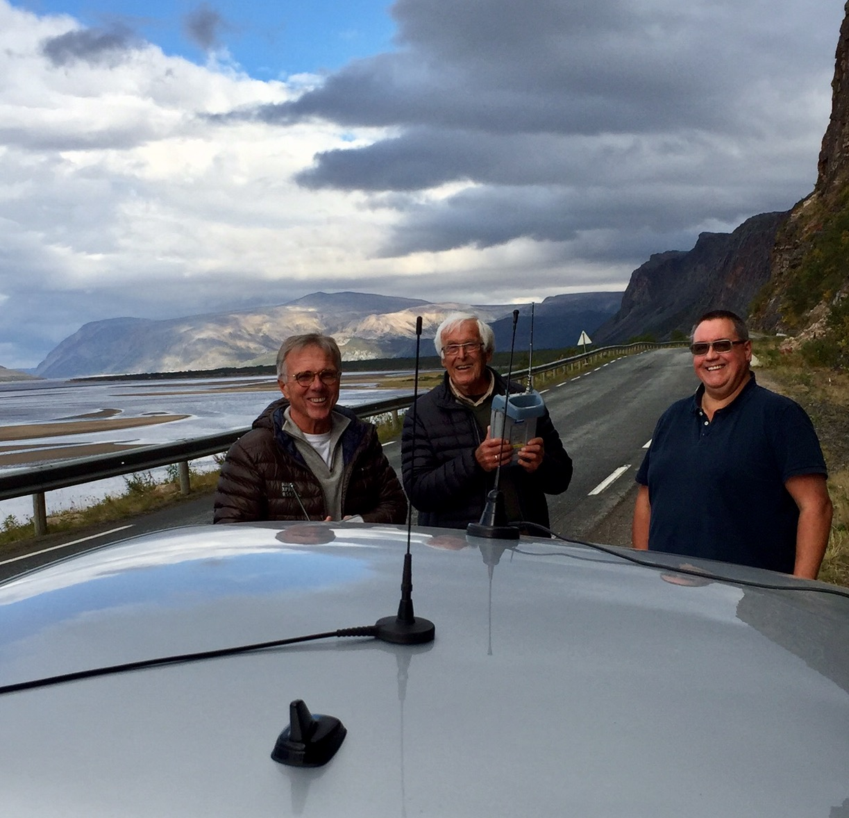 NRK og P4 sitt DAB måleteam: Petter Hox (NRK), Tore Øvensen (NRK) og Olav Fostås (P4).